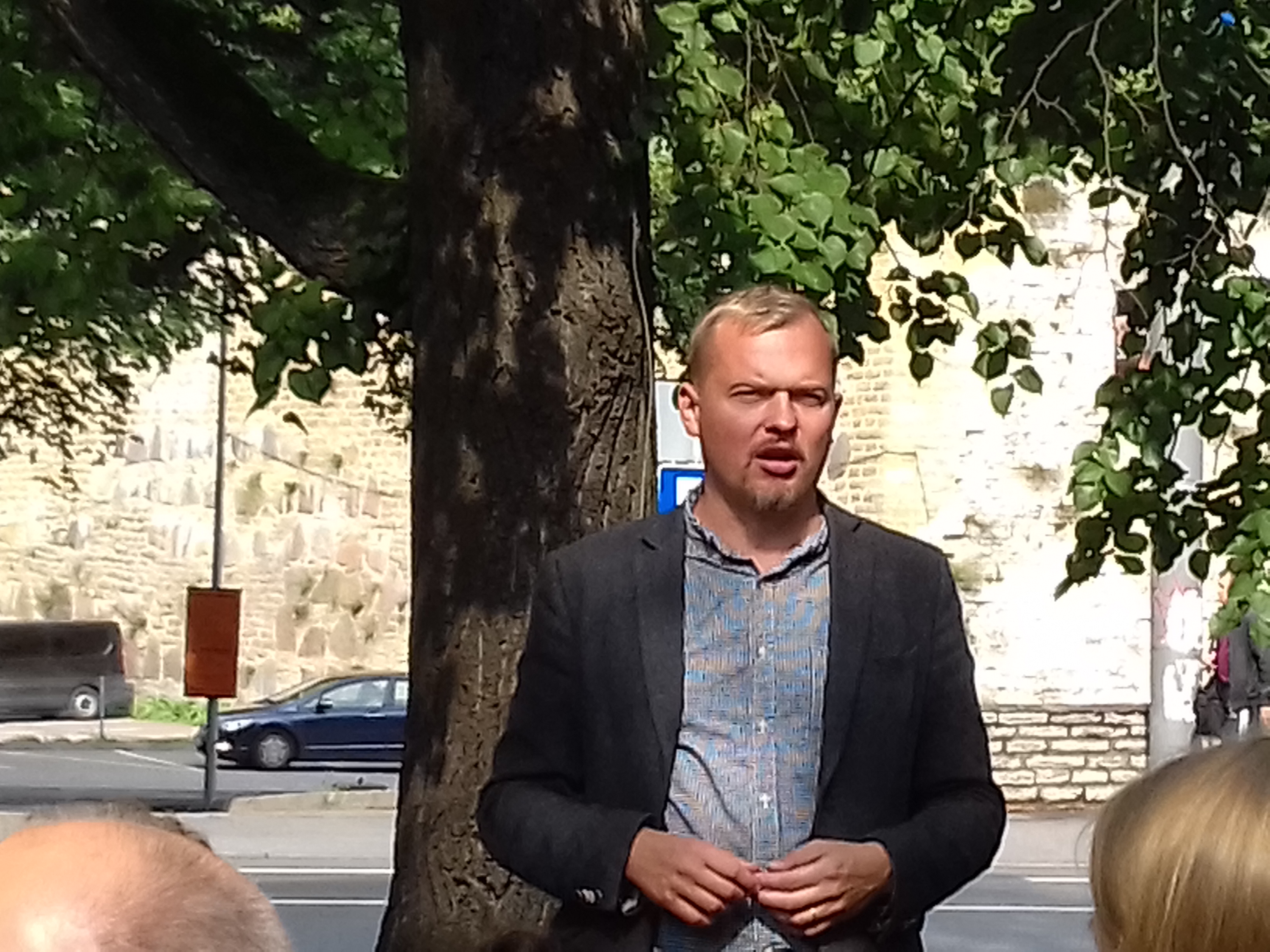 Jaak Juske Tõnismäe ajaloomatka läbi viimas